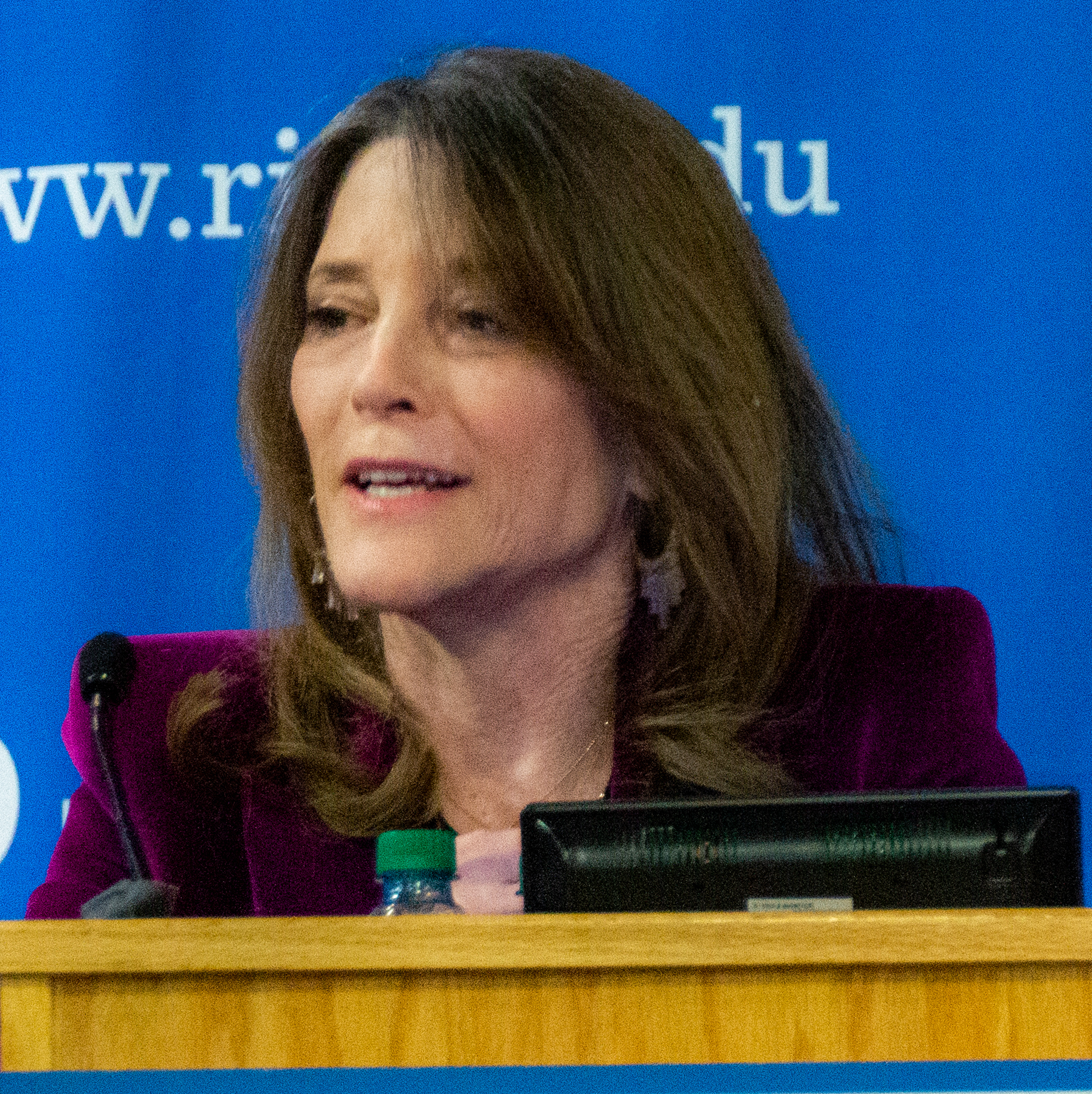 Marianne Williamson